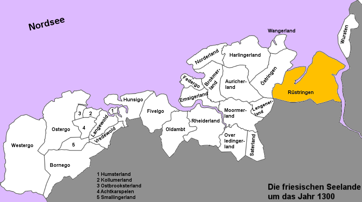 Karte der freien friesischen Seelande (Landesgemeinden) von der Zuiderzee bis zur Weser in den Grenzen um das Jahr 1300. Rüstringen hervorgehoben. (Karte ohne Inseln.)